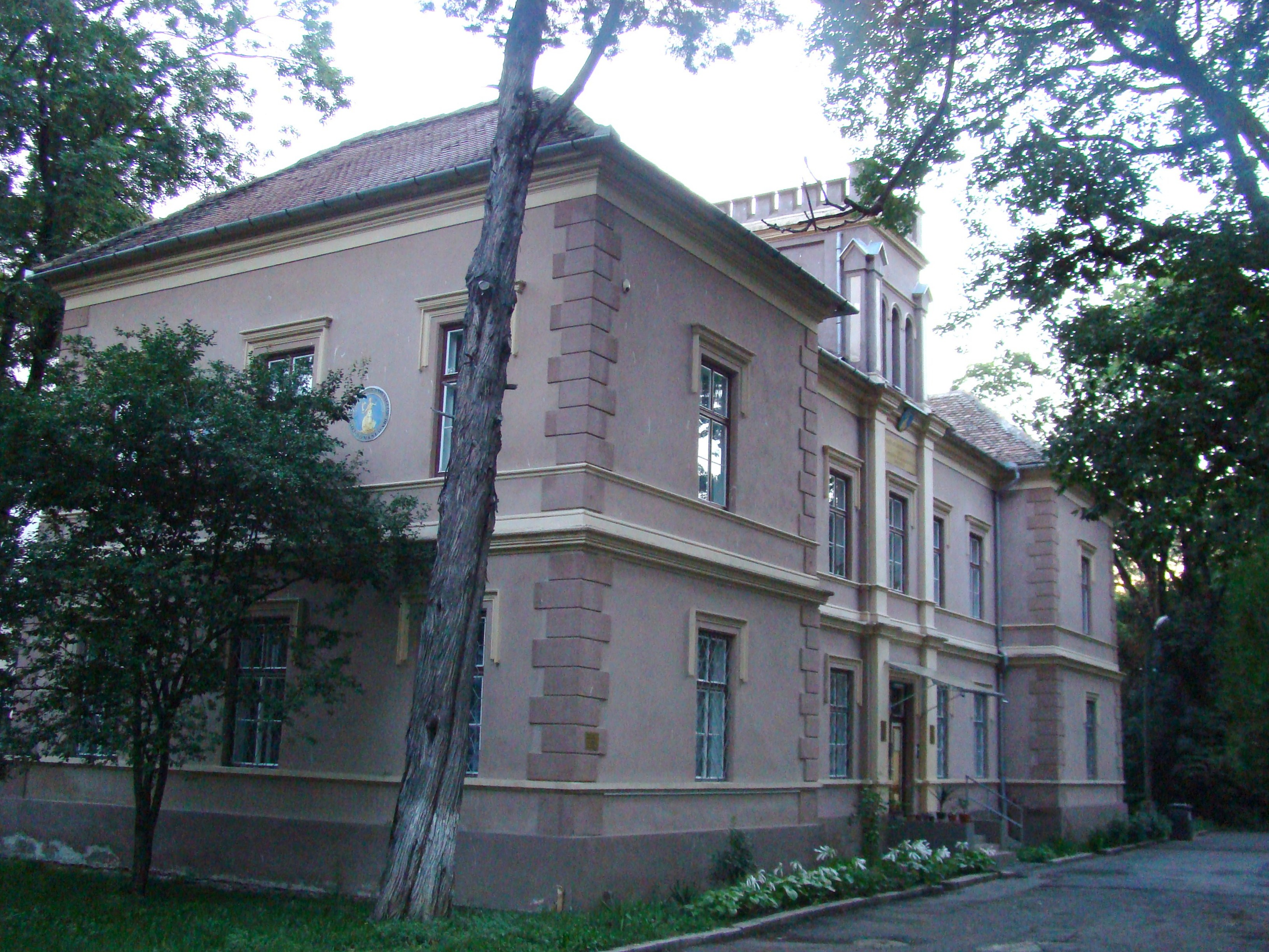 Ansamblul fostului seminar evanghelic din Sibiu (Corpul B) 02